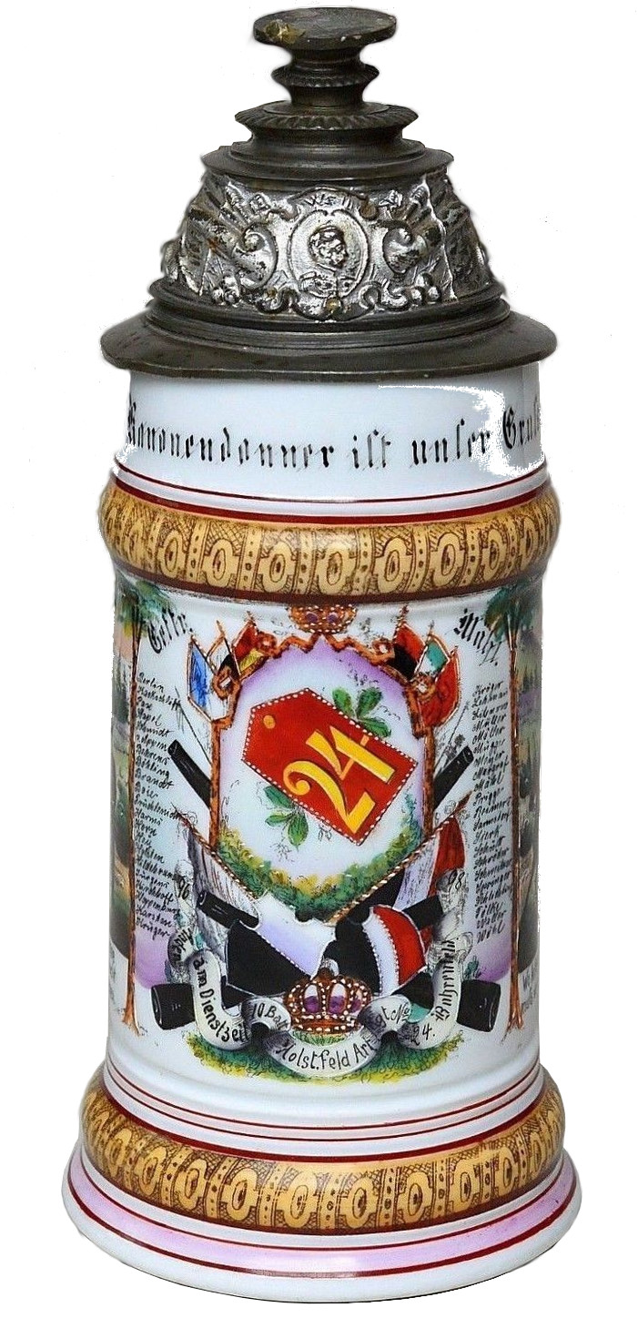 Feldartillerie-Regiment 24 - Reservistenkrug, Dienstzeit 1896 - 1898, Bahrenefeld